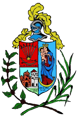 Escudo del municipio San Sebastian de los Reyes. Estado Aragua. Venezuela